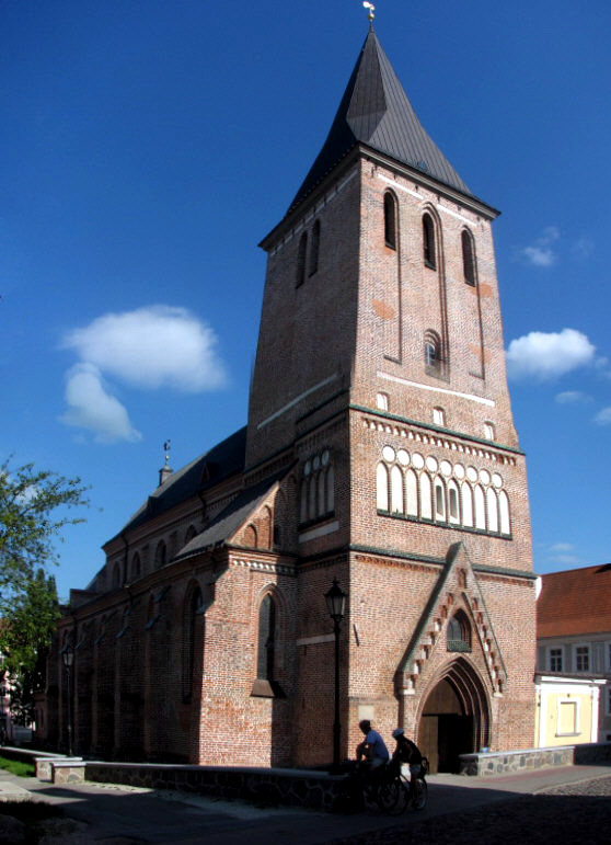 Tartu Jaani Church, Tartu, Estonia